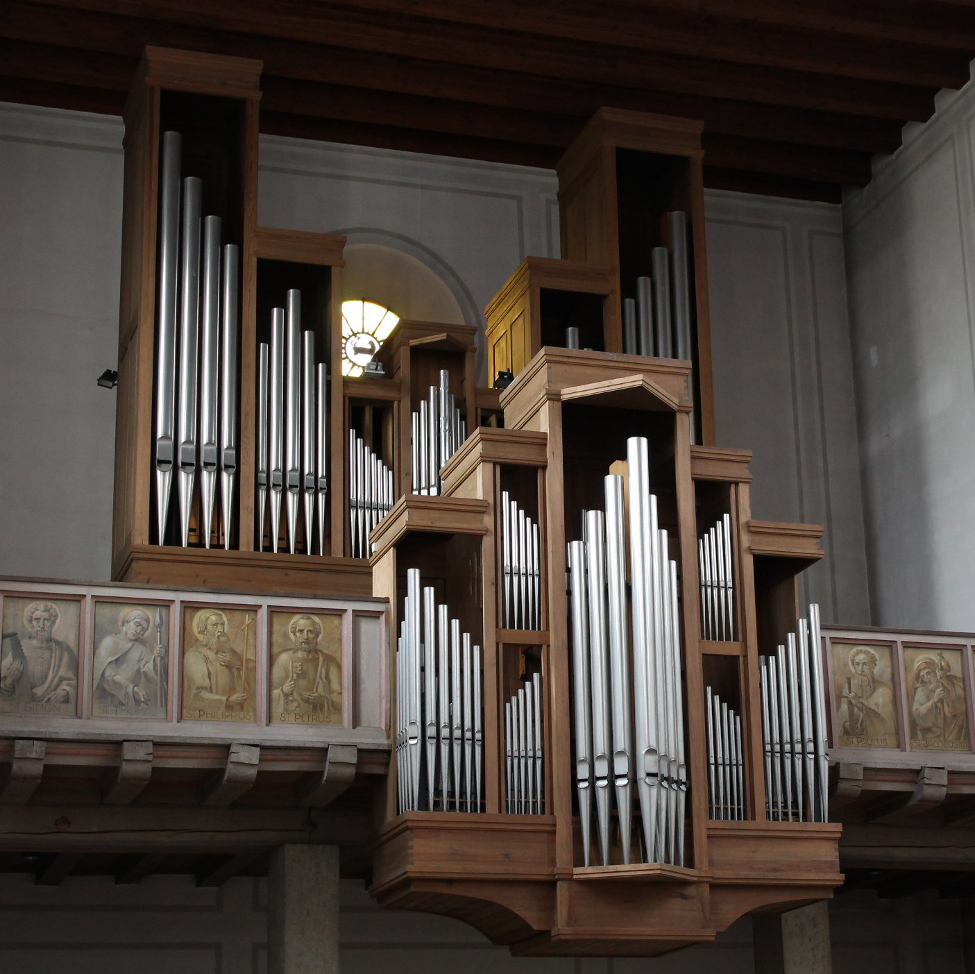 Orgel von St. Emmeram in München (1976, Hubert Sandtner, II/23)